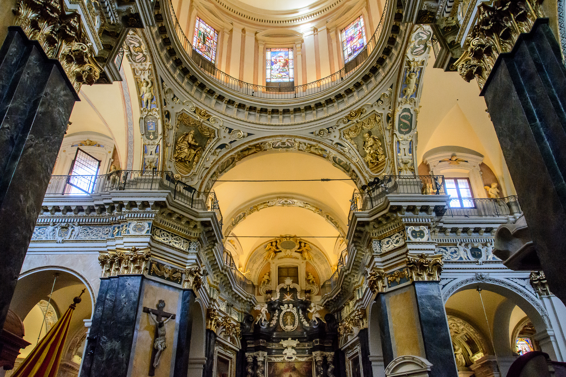 Nice, cathédrale sainte Réparate, transept nord.